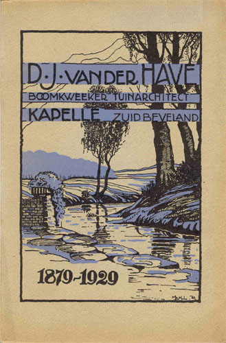 Prijscourant met aandacht voor het 50 jarige bestaan